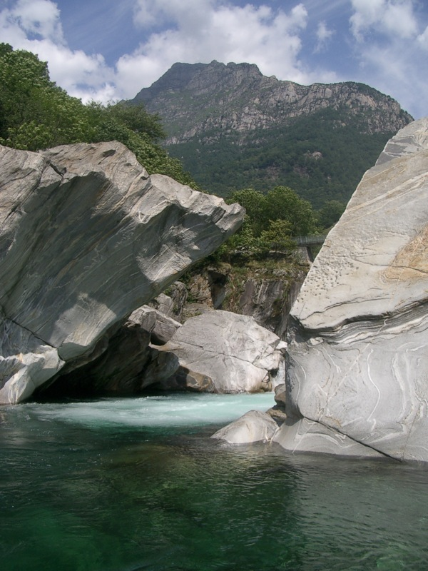 Verzasca river, Ticino.jpg